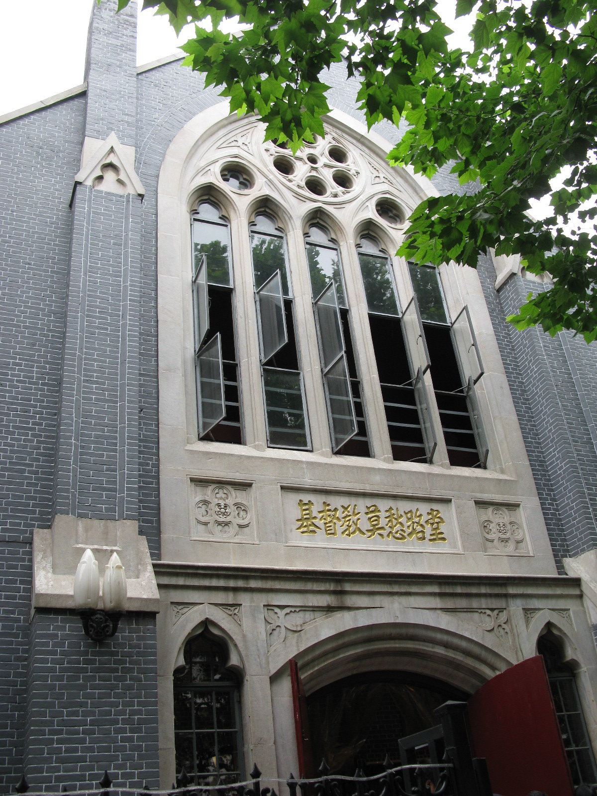 Eaglais